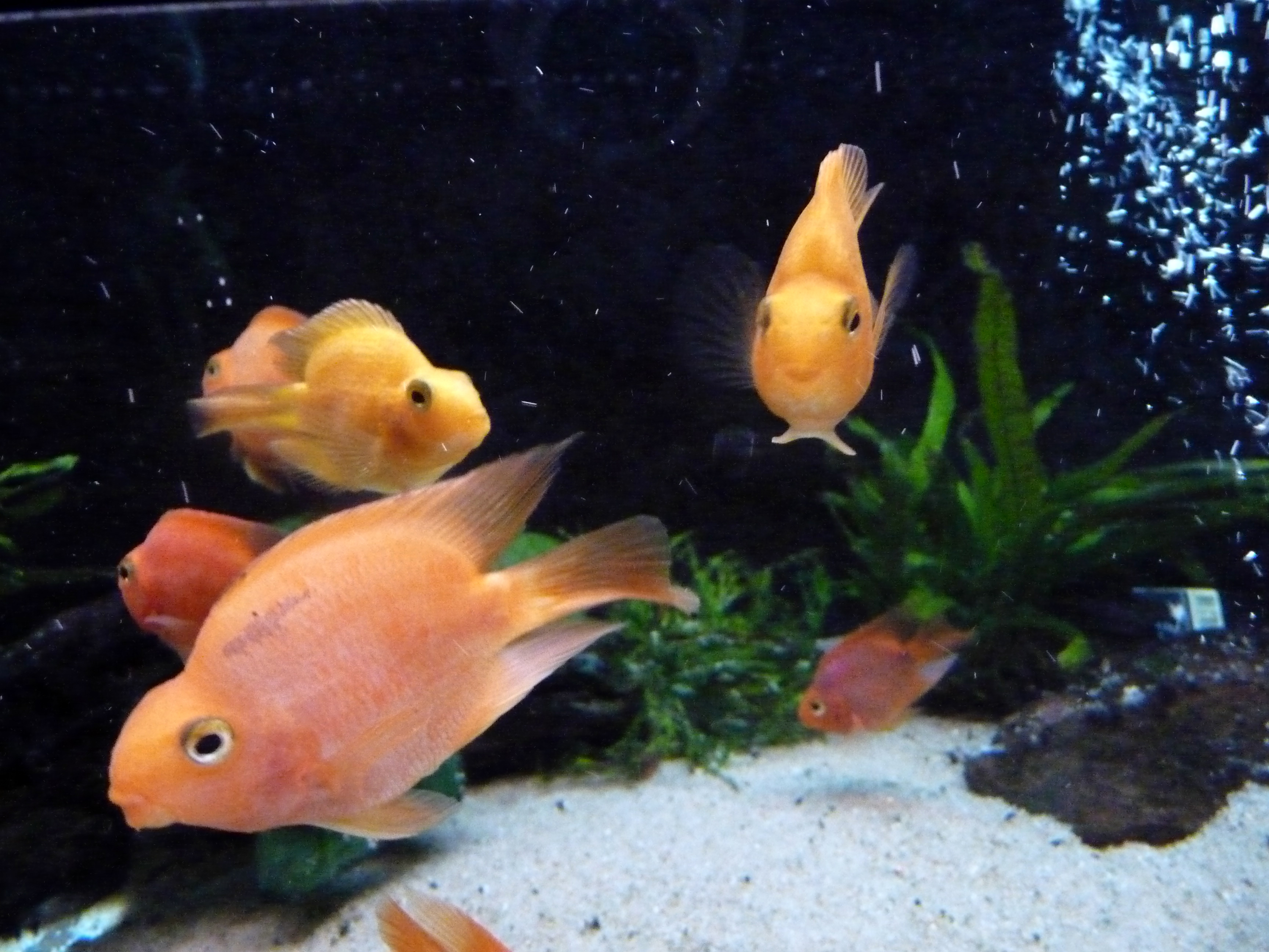 Red parrot, poisson Cichlidé hybride